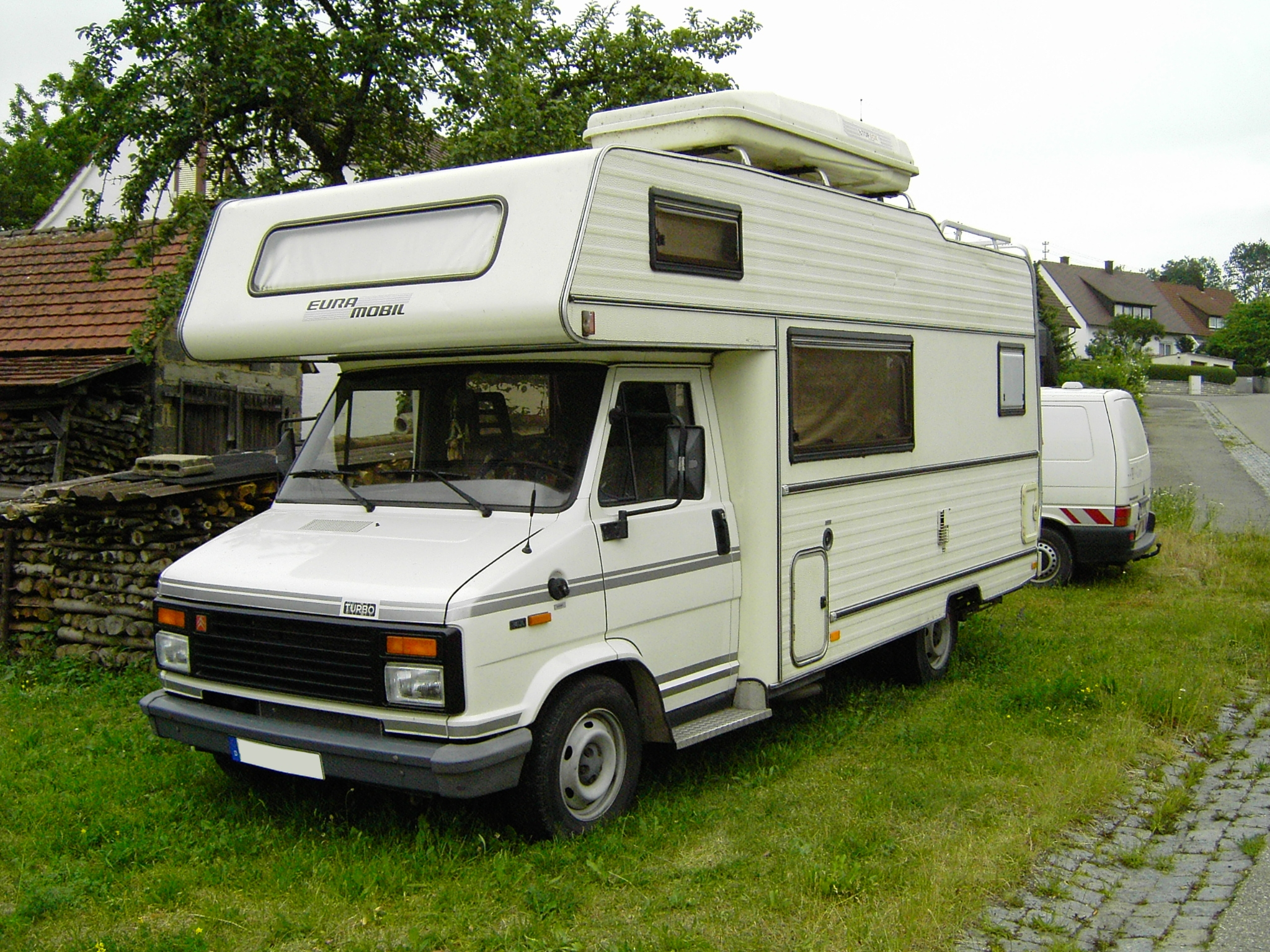 Citroen C25 RV Turbodiesel